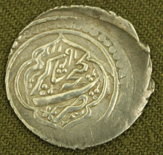 Гянджинское ханство серебряная монета 1777 год.